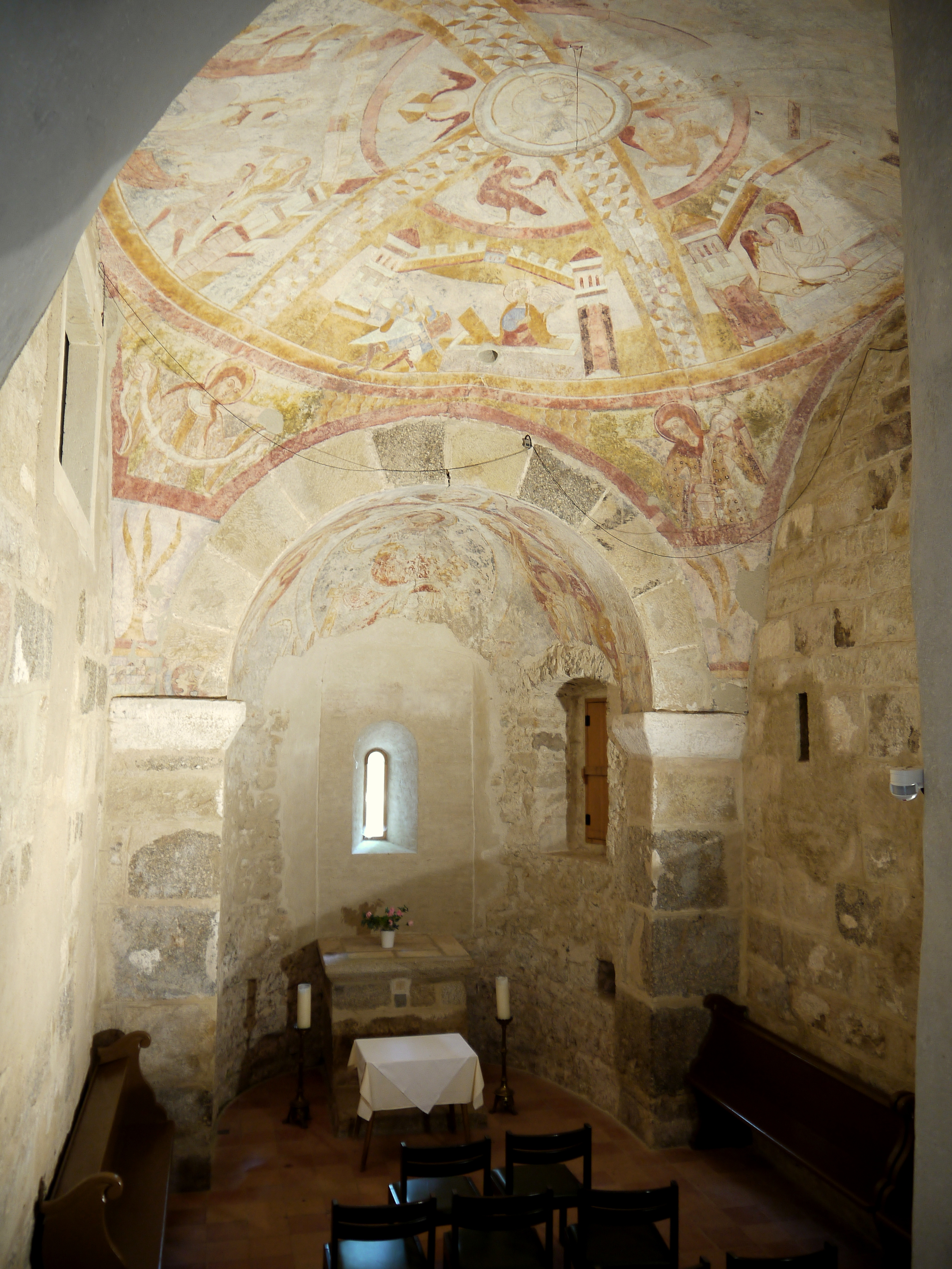 Burganlage Ottenstein